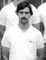 Title: Mannschaftsfoto 1. FC Union Berlin Factual corrections and alternative descriptions are encouraged separately from the original description. Additionally errors can be reported at this page to inform the Bundesarchiv. Original historic description: ADN-ZB-Mittelstädt-23.8.83-zin-Berlin: Die Mannschaft des 1. FC Union Berlin für die Fußball-Oberligasaison 1983-84. Vorn v.l.n.r.: Peter Riedtke, Torhüter Björn Dahms, Torhüter Wolfgang Gehrke und Bernd Quade. Mitte v.l.n.r.: Olaf Seier, Olaf Reinhold, Peter Wirth, Reiner Thomas und Ingo Kimmritz. Hinten v.l.n.r.: Henry Treppschuh, Mannschaftskapitän Lutz Möckel, Lutz Hovest, Holger Sattler, Heiko Lahn, Uwe Borchardt und Lutz Hendel.